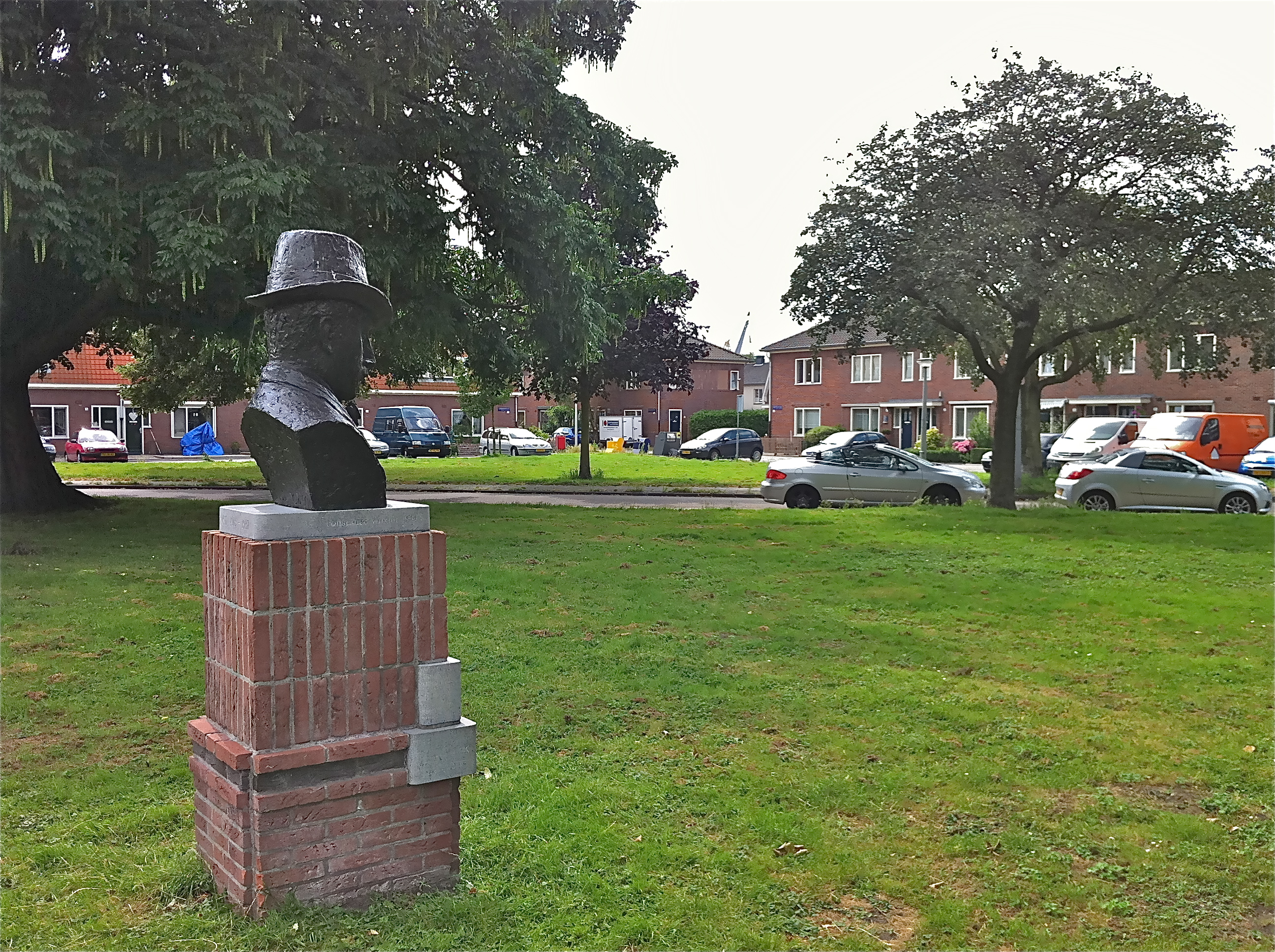 Tuindorp Oostzaan Amsterdam-Noord juli 2011